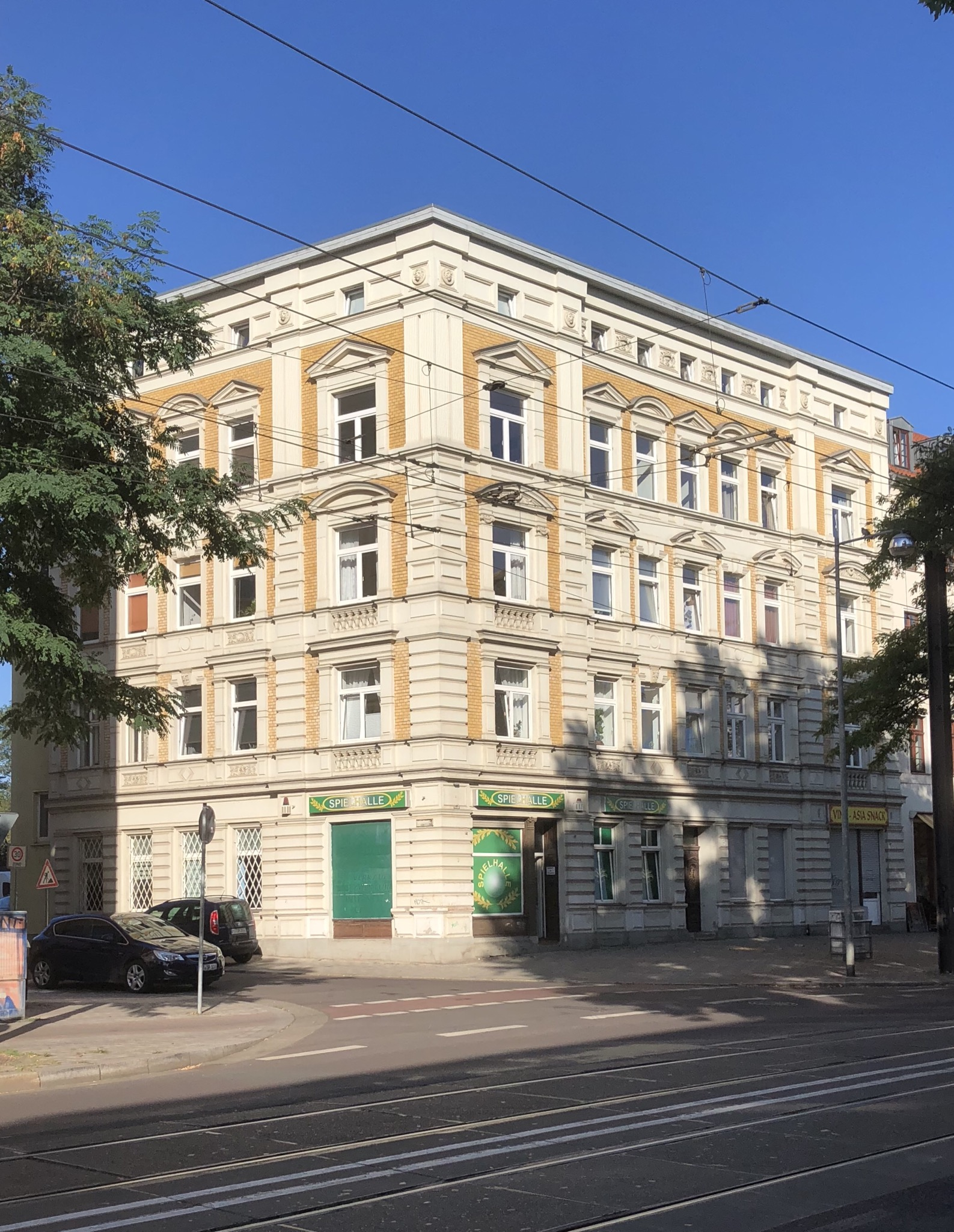 Eckhaus Schönebecker Straße